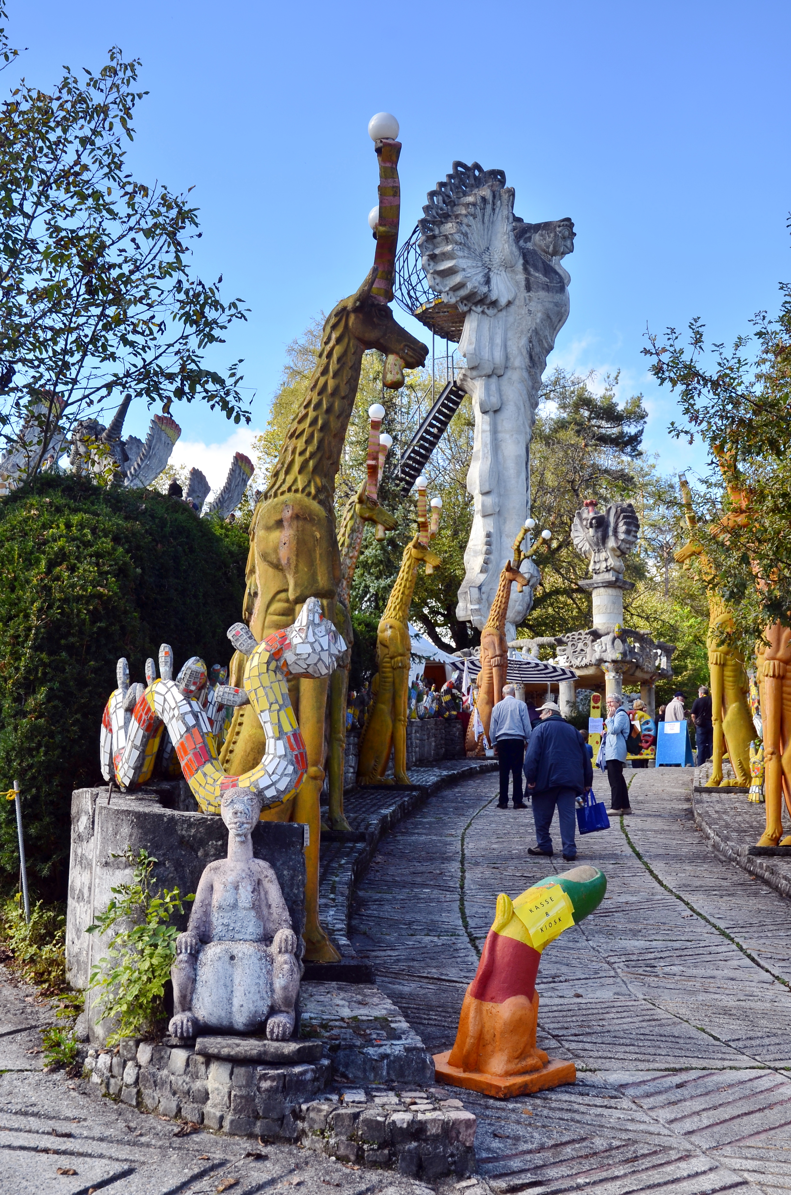 Bruno Weber Park in Dietikon - Spreitenbach (Switzerland)